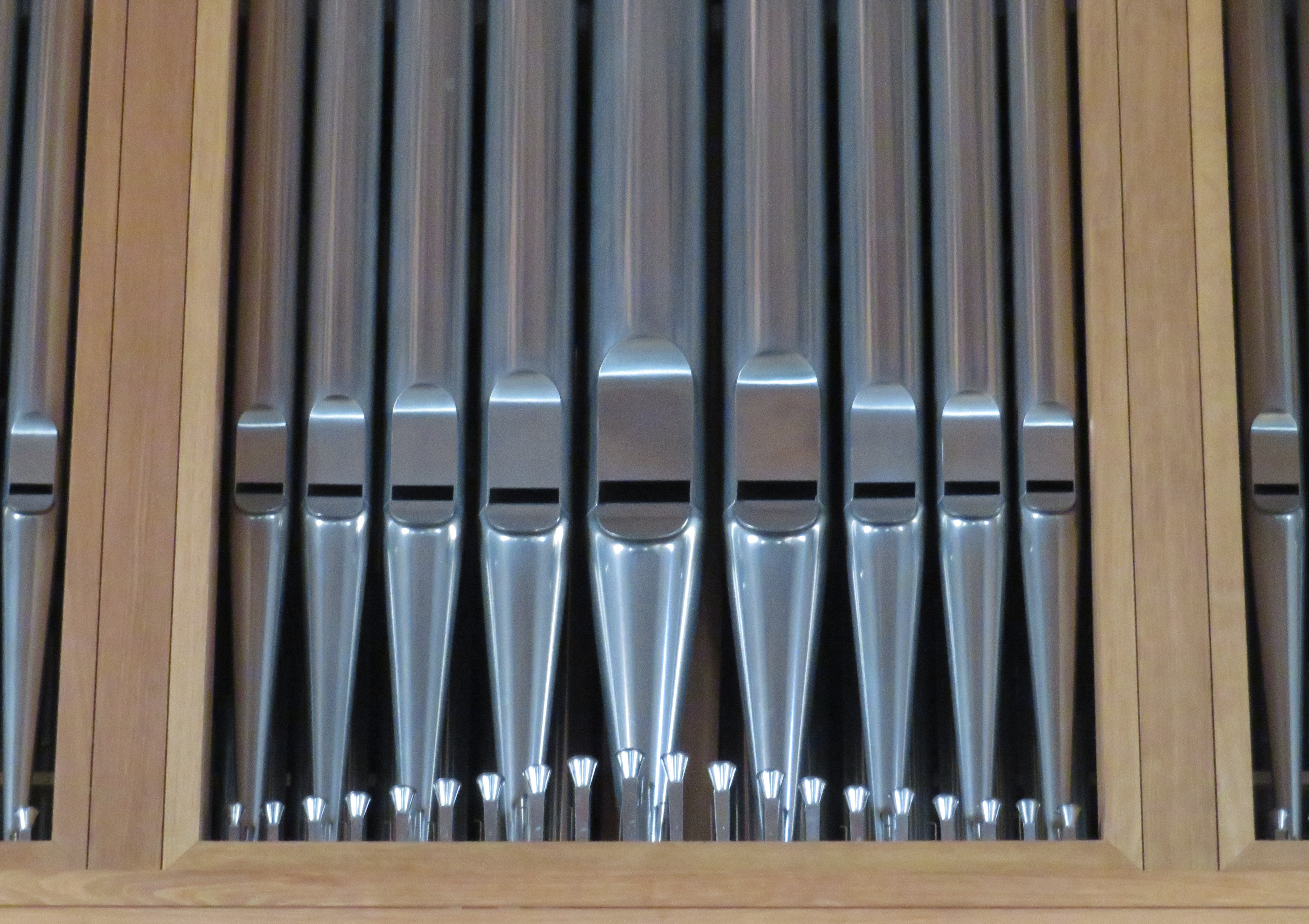 Orgel von Mathis Orgelbau, erbaut 1994 für die Kirche Santa Maria della Misericordia in Ascona, Tessin, Schweiz (Detail)